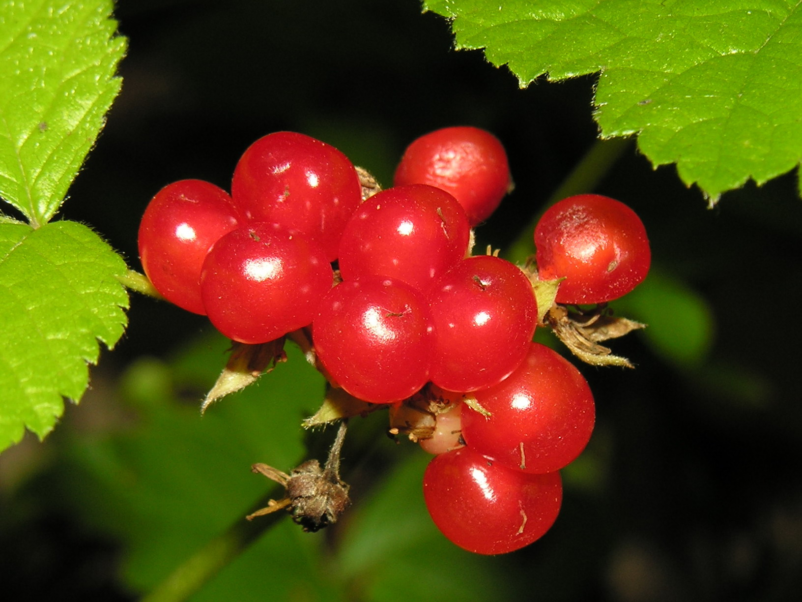 Paprastoji katuogė (Rubus saxatilis) Šeima. Erškėtiniai (Rosaceae) Foto: Algirdas, 2006 m. rugpjūčio 4 d., Lietuva